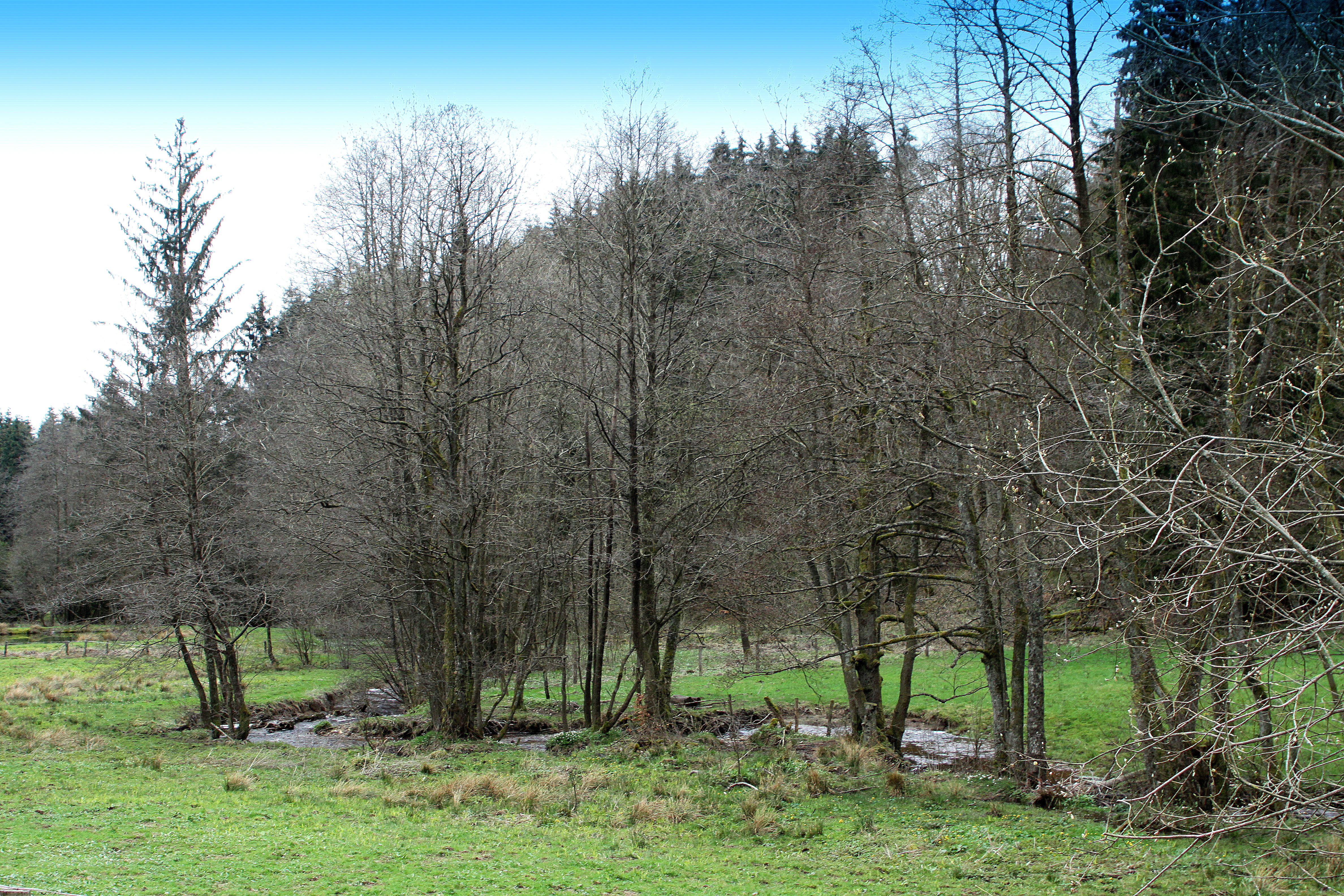 Eau de Martin Moulin um Martin Moulin